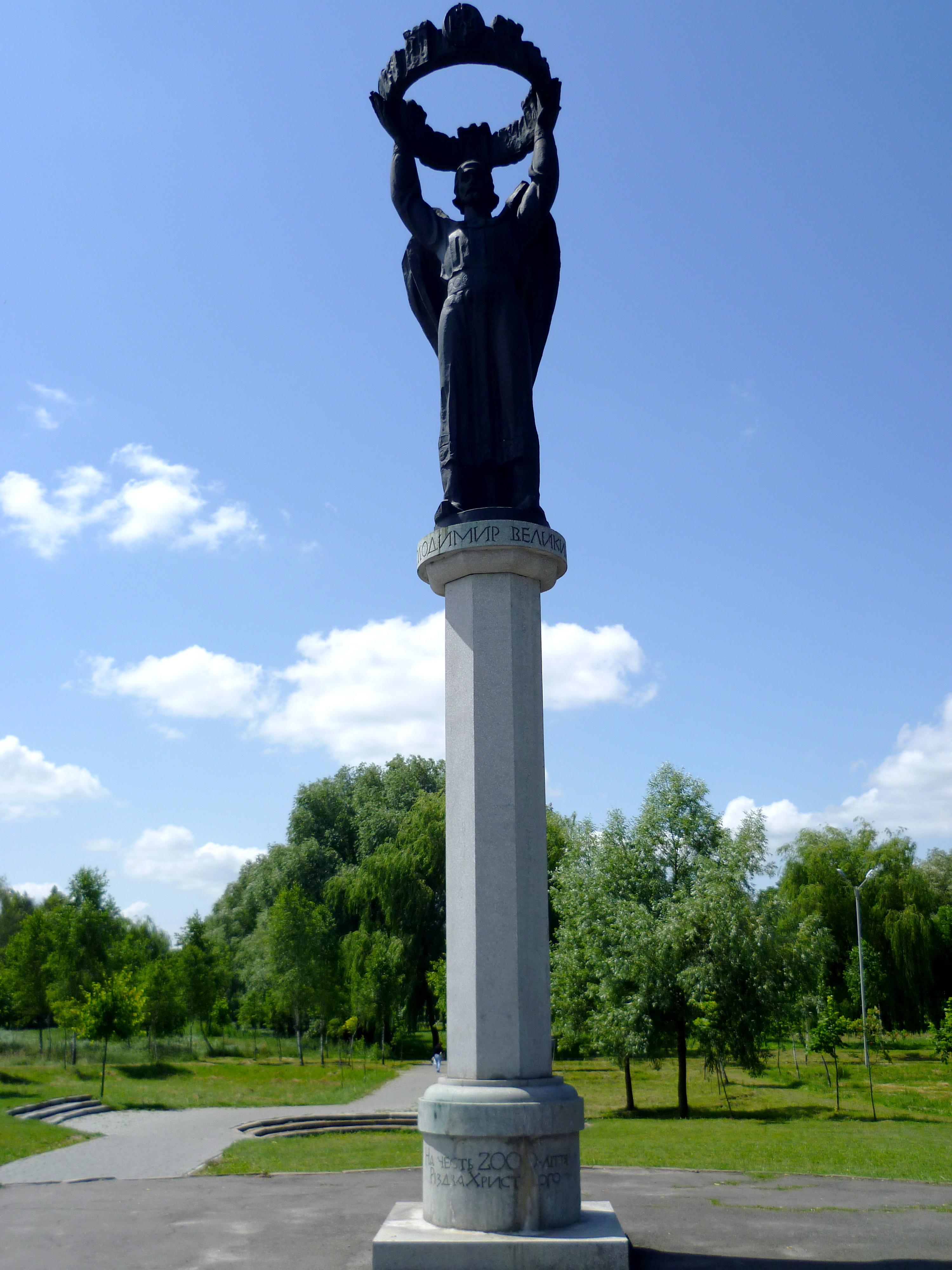 Парк-пам'ятка садово-паркового мистецтва "Слов'янський" - пам'ятник Володимиру Великому - Володимир-Волинський Волинська область Україна